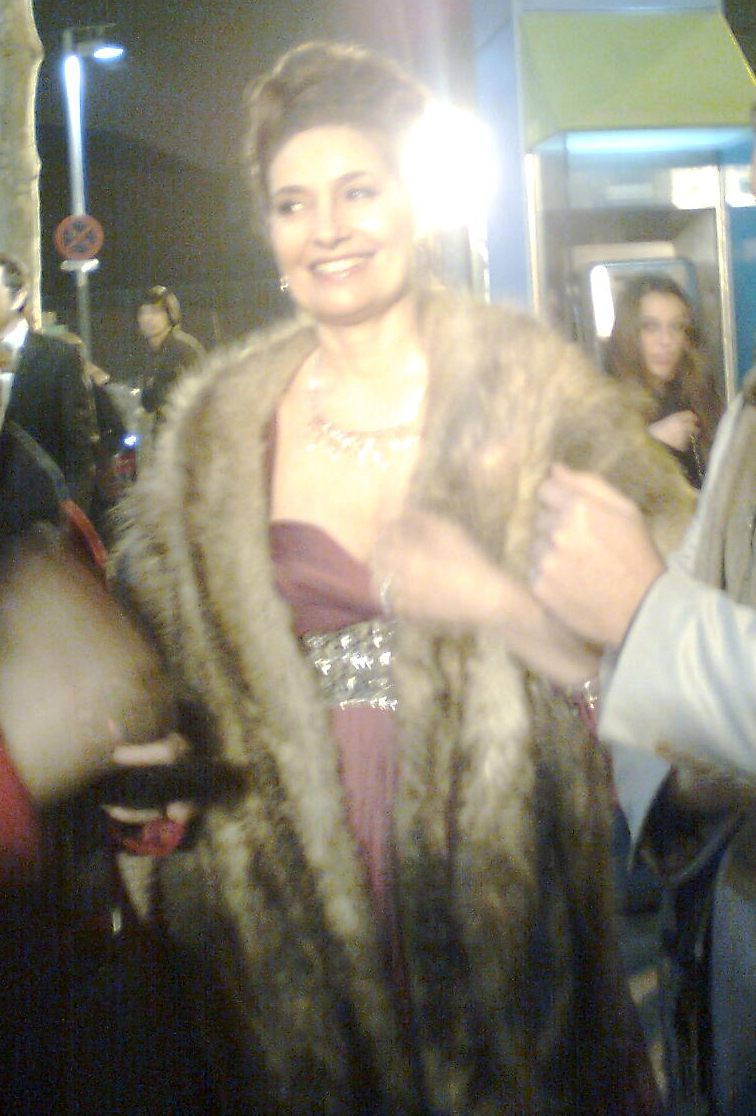 L'actriu Assumpta Serna als III Premis Gaudí